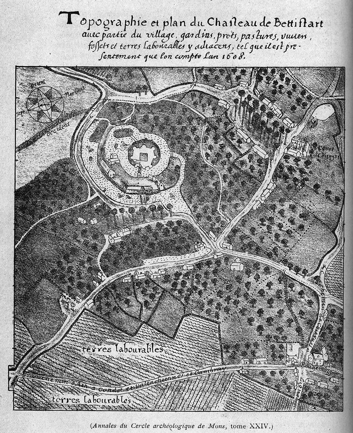 seigneurie de Béttiftart